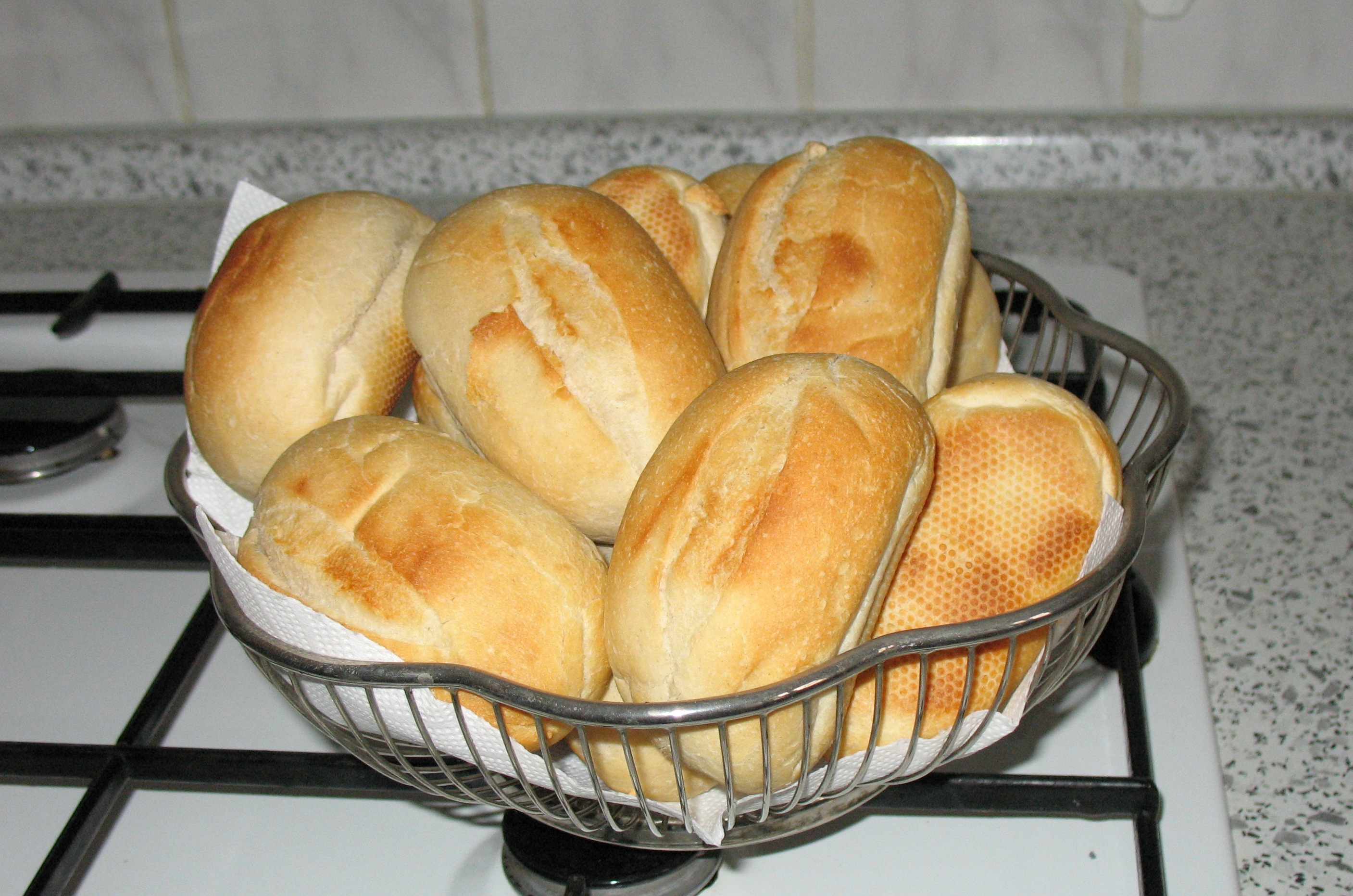 Bread rolls in a basket (deutsch: Brötchen im Korb)